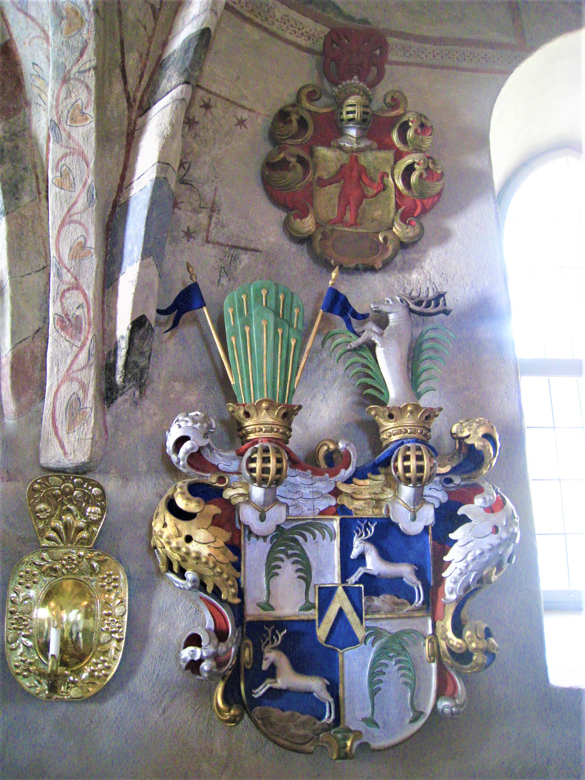 Ytterjärna kyrka, Södermanland, huvudbanér och vapen.